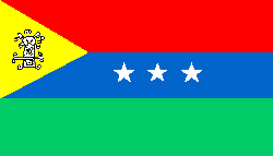 Bandera del municipio Guacara, estado Carabobo, Venezuela